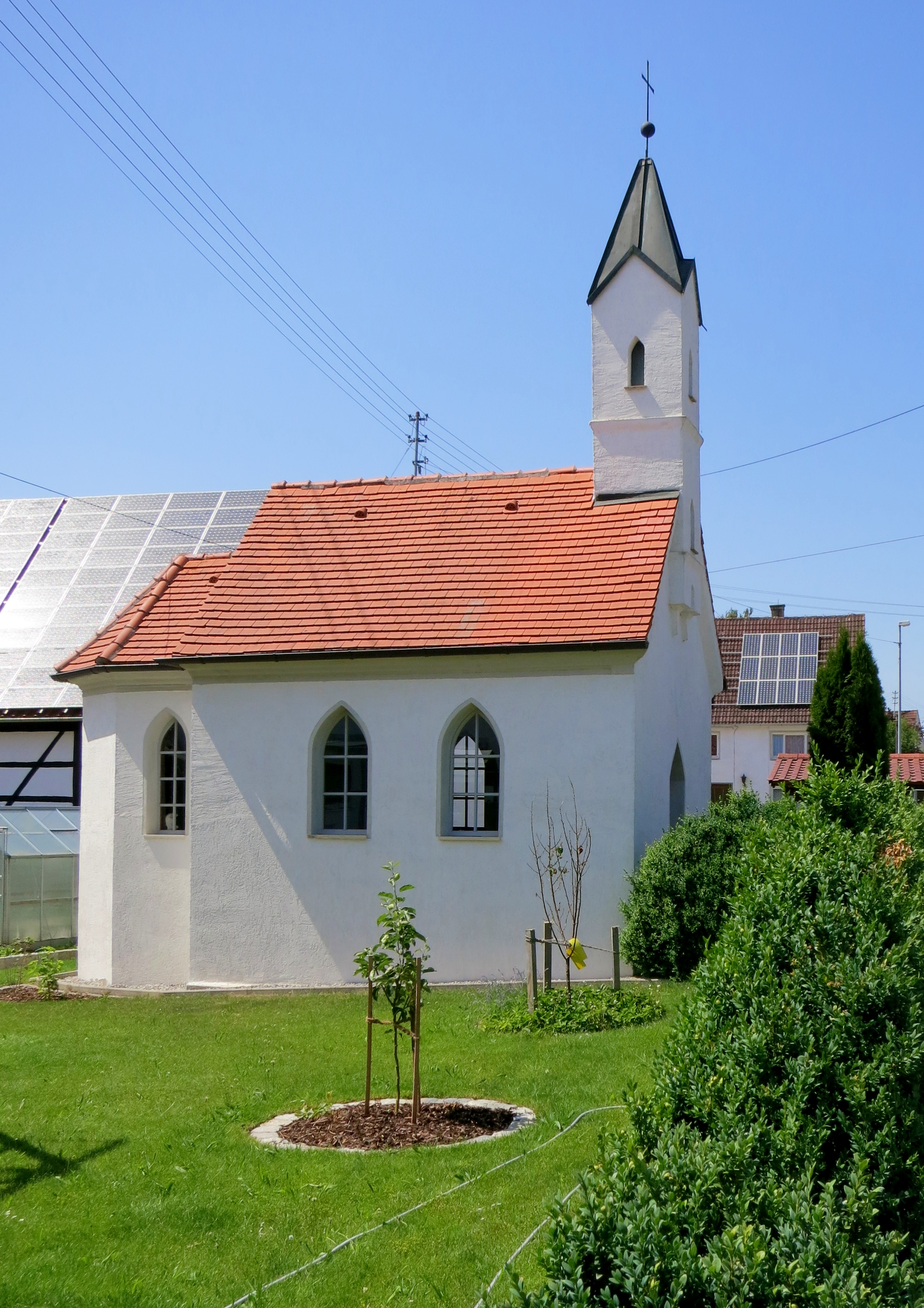 Kapelle (Naichen) Ansicht aus SüdOst